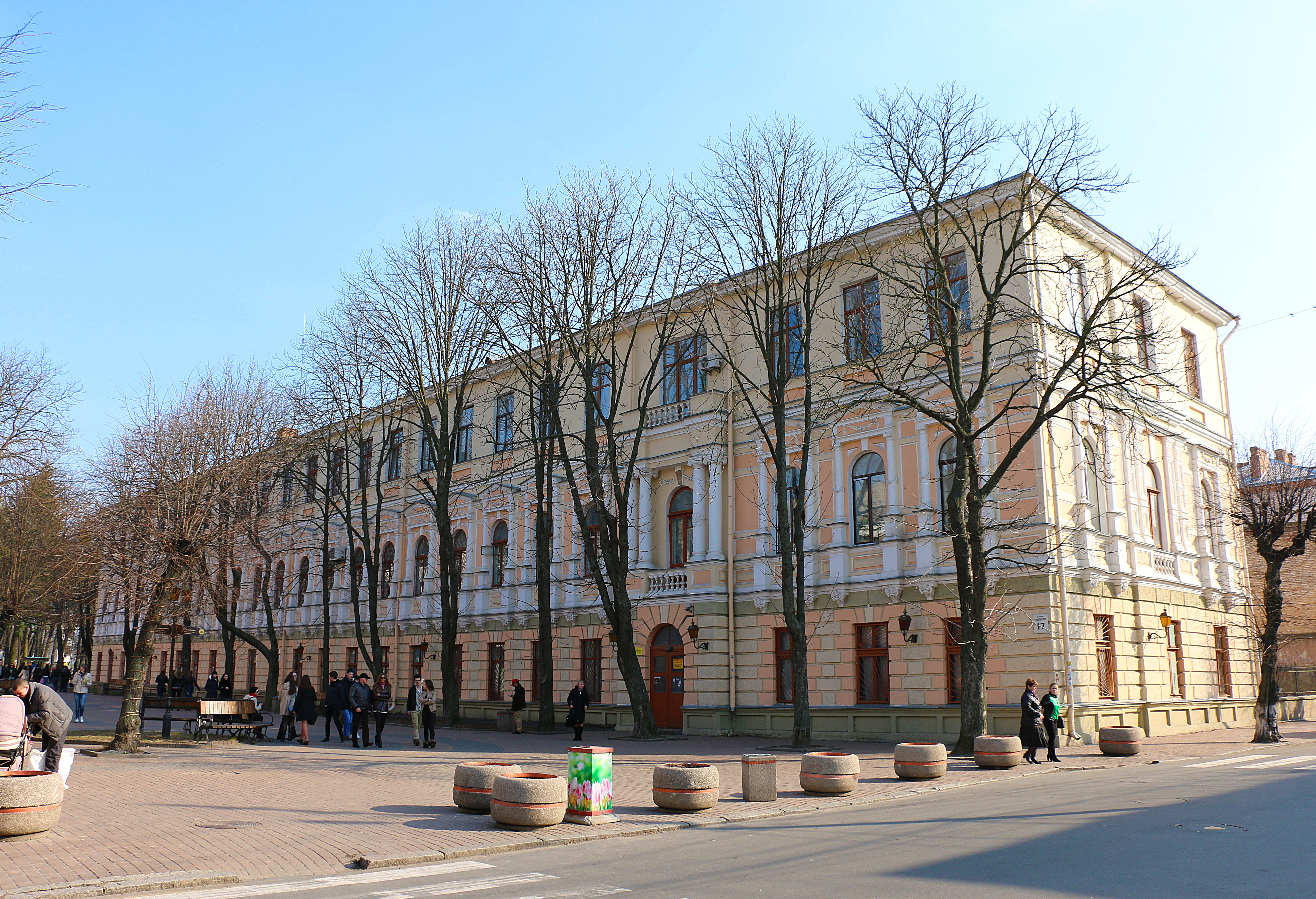 Будинок окружного суду, в якому працював організатор кооперативного руху на Поділлі, письменник, міністр юстиції УНР Д.В. Маркович, Вінниця, вул. Грушевського, 17/11